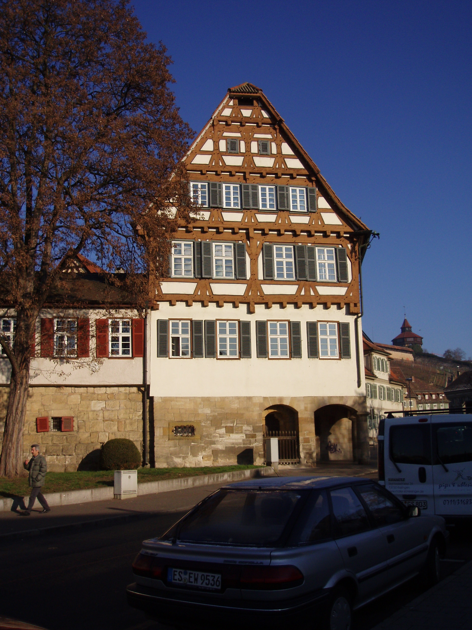 ehemalige Lateinschule in Esslingen am Neckar